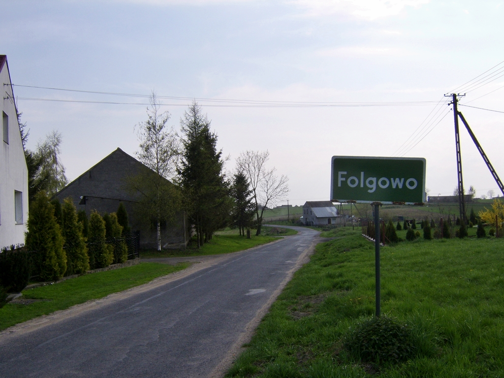 Wieś Folgowo